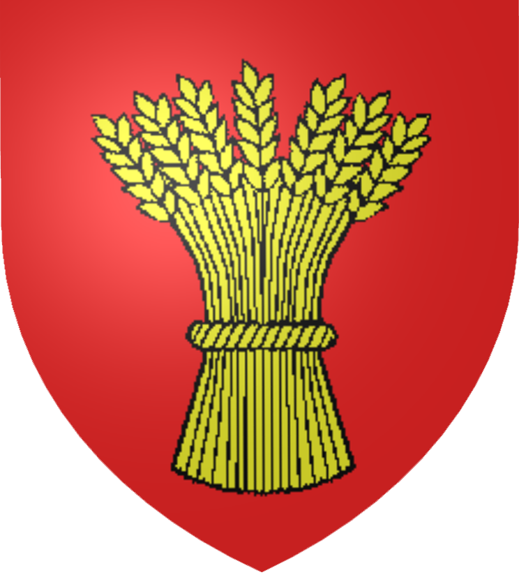 Blason de l'ancienne province du Gévaudan.